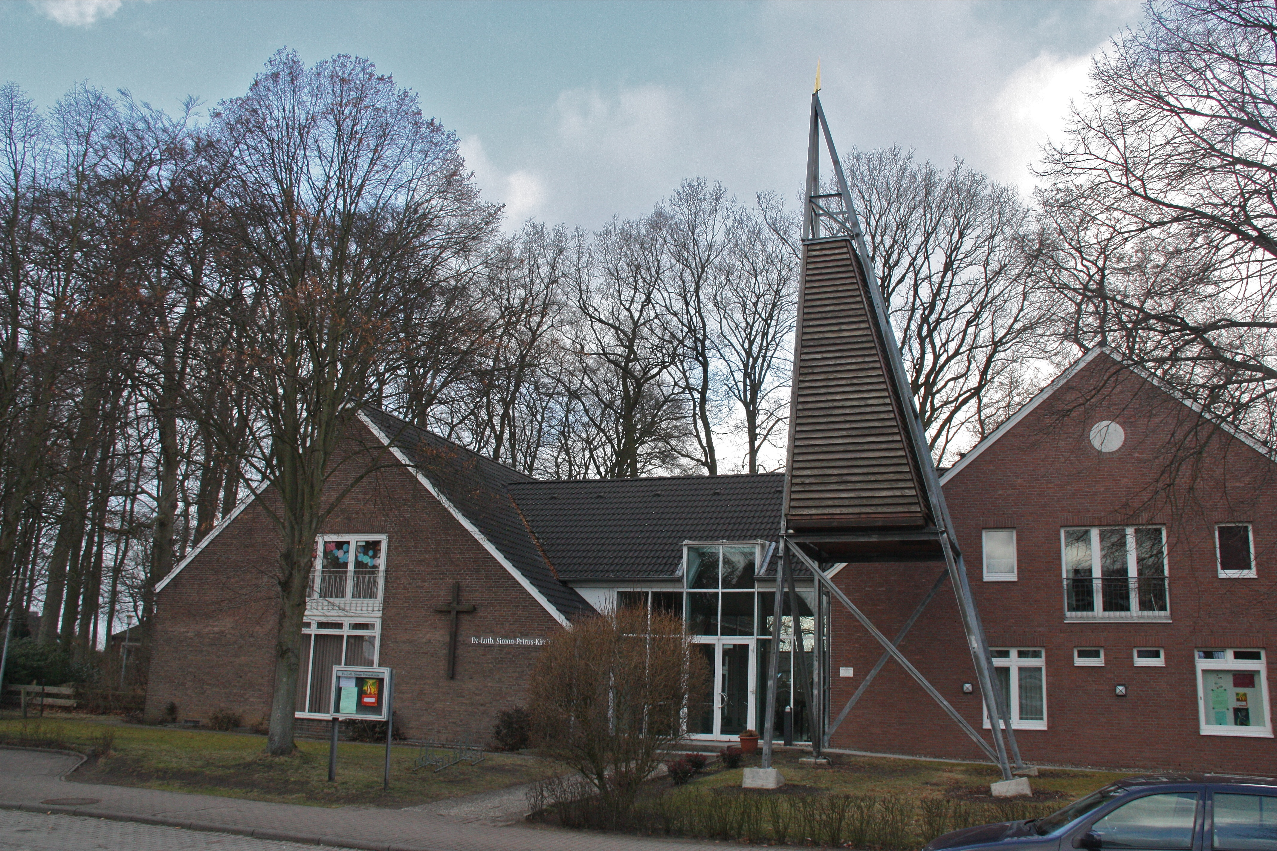 Bönningstedt, Kirche